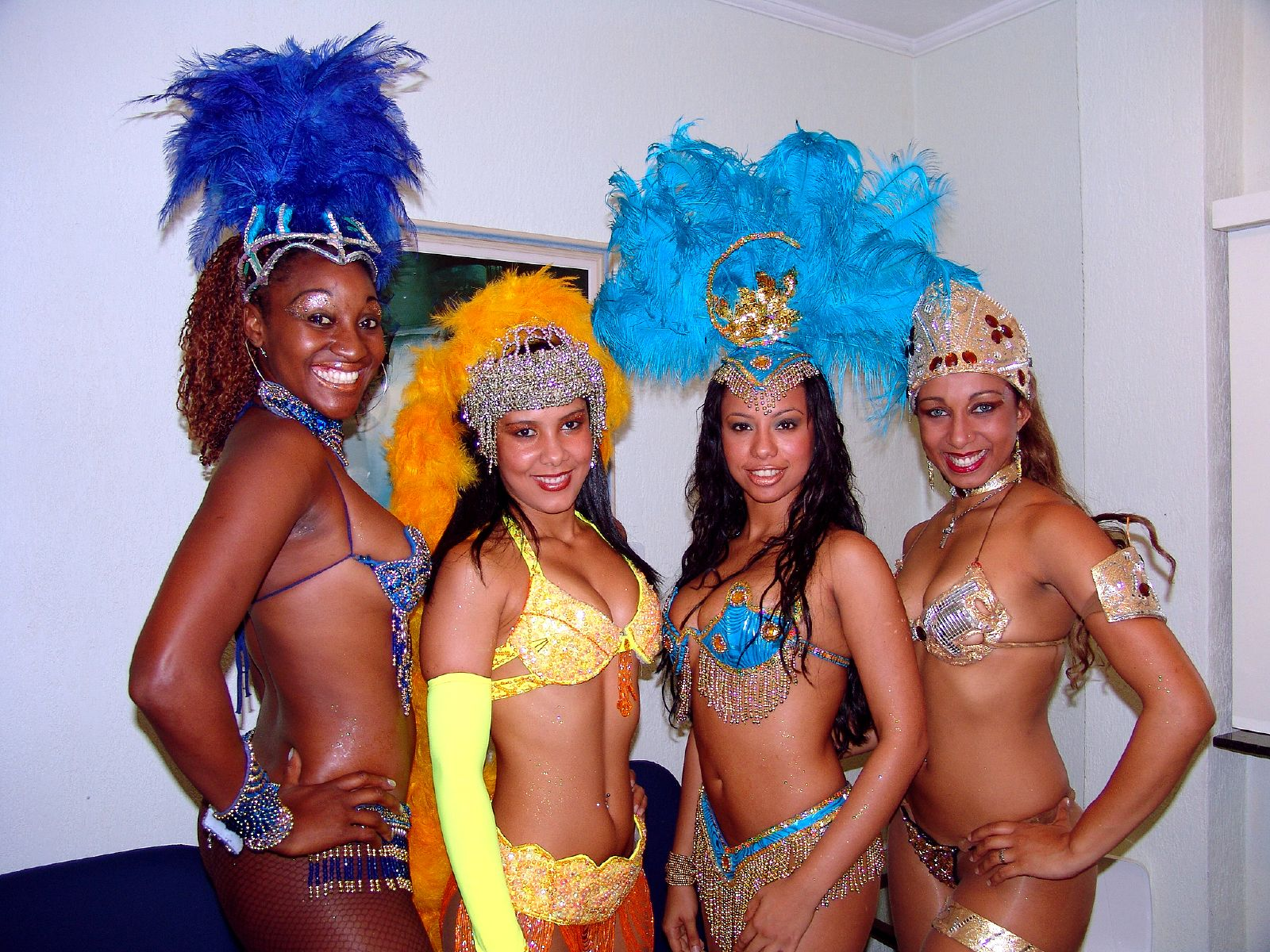 Creolé Show - Samba dancers.